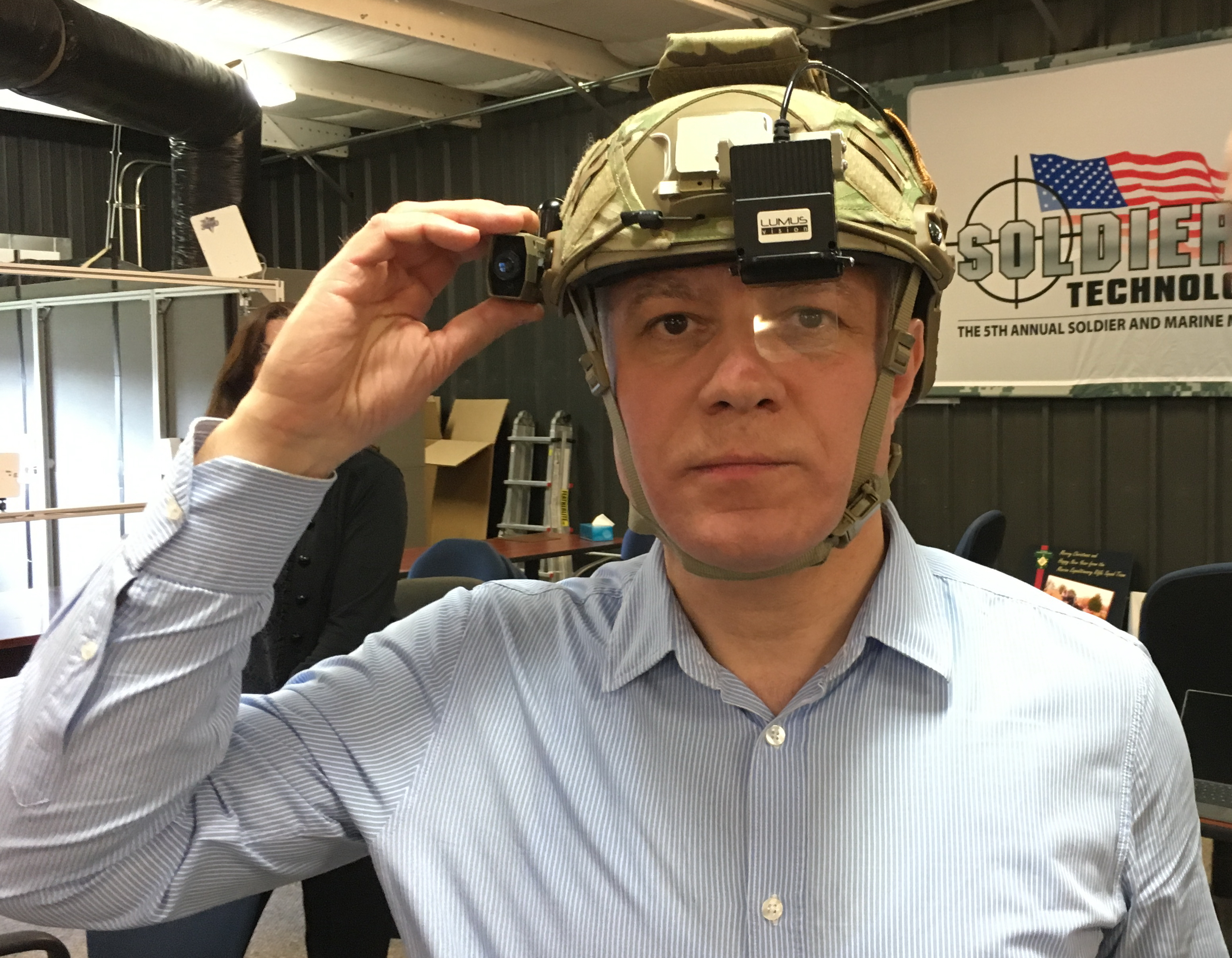 Helmet Augmented Reality System ARC4 (USA)